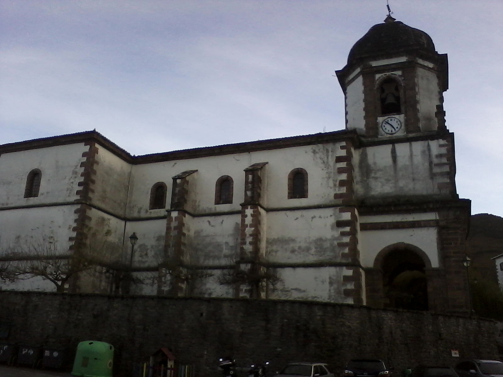 Iglesia de la Asunción del siglo XVIII. Destruida parcialmente por las tropas francesas de Napoleón en 1793.